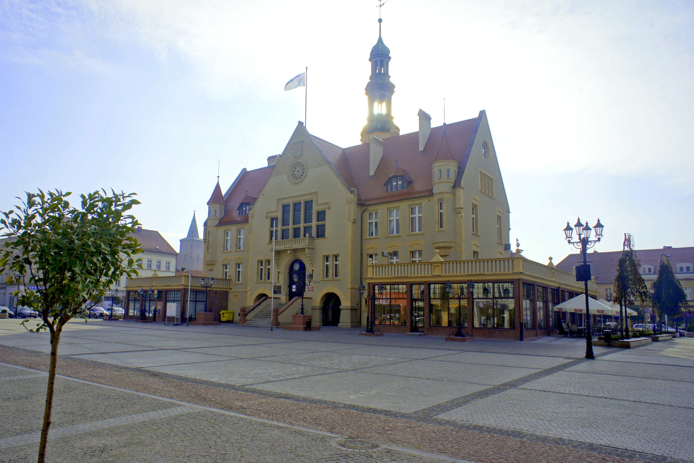 Ratusz w Krotoszynie – budynek murowany z około 1689 roku, przebudowany w latach 1898-1899 na neorenesansowy. Ponadto, przebudowa w 1968 oraz remont w 2014 roku.